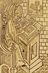 St. Brynolphos